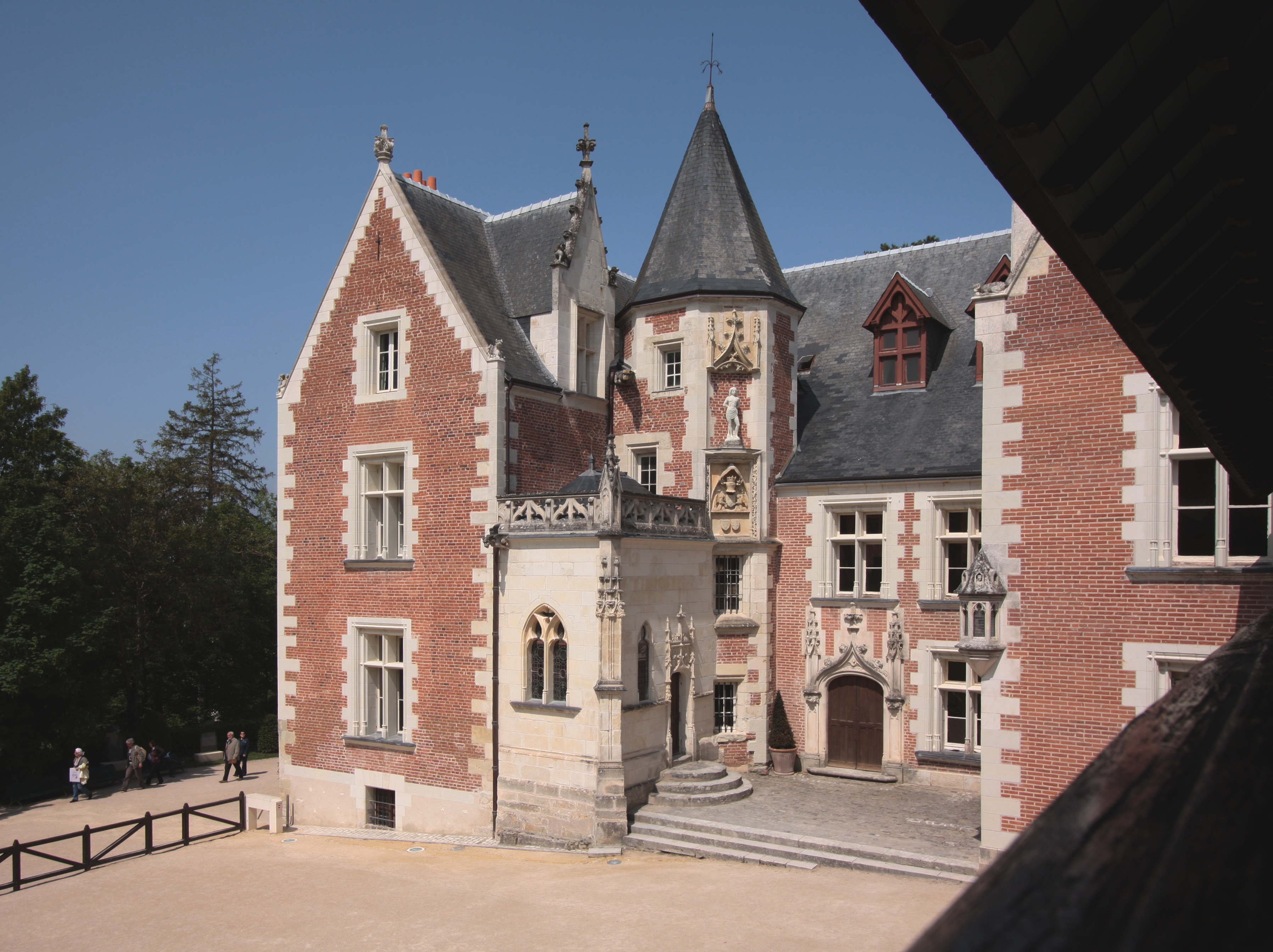 Schloss Clos-Lucé, Departement Indre-et-Loire/Frankreich - Blick von der Holzgalerie auf die Fassade des Anwesens